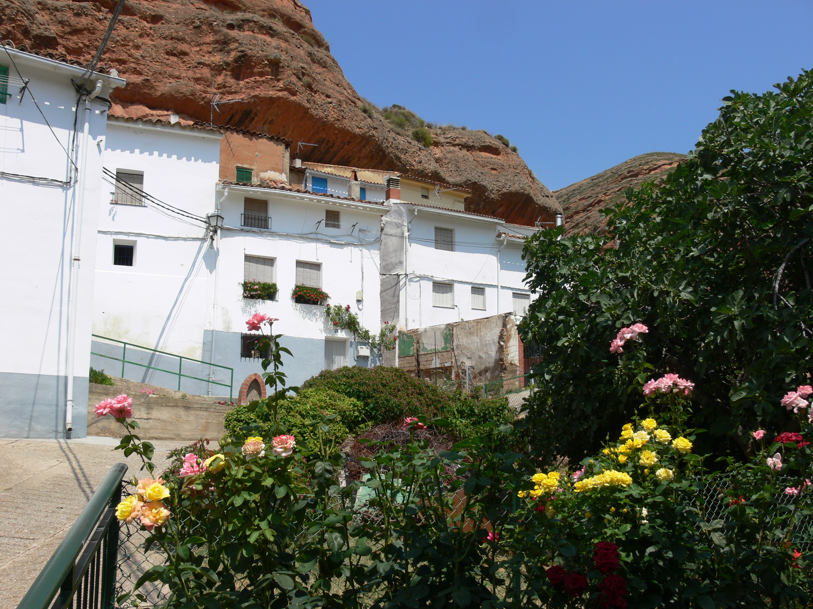 SANTA EULALIA SOMERA. Un bello rincón del pueblo.